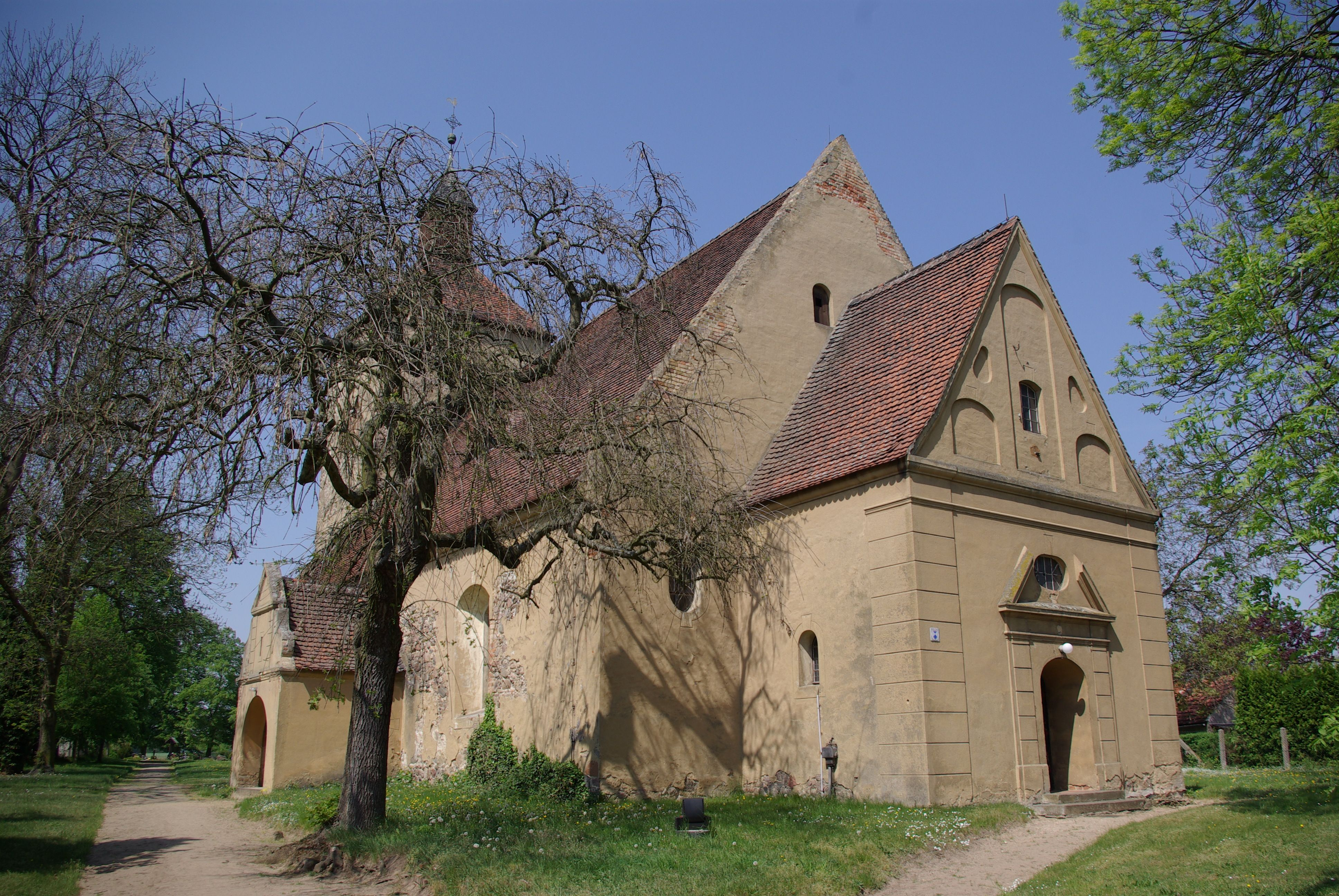 Märkiche Heide in Brandenburg. Die Kirche steht inm Ortsteil Groß Leine und steht unter Denkmalschutz.